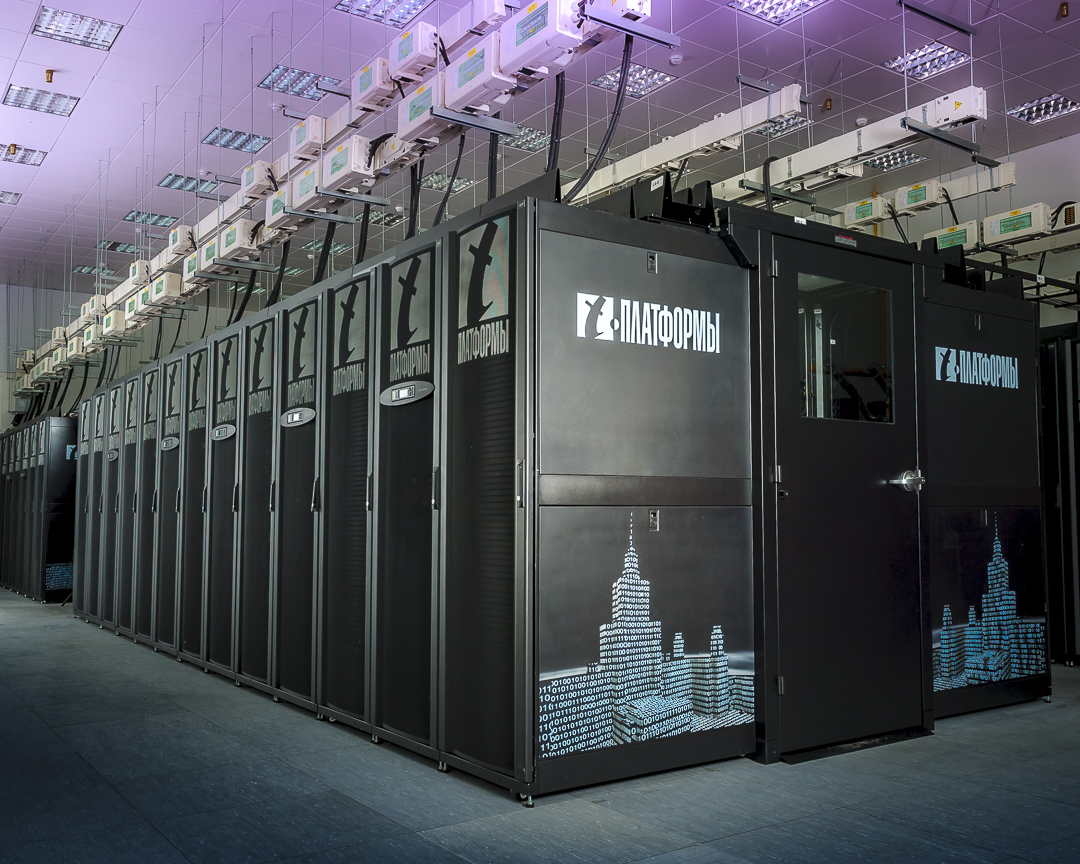 Суперкомпьютер «Ломоносов» — первый гибридный суперкомпьютер такого масштаба в России и Восточной Европе. Установлен в НИВЦ МГУ.